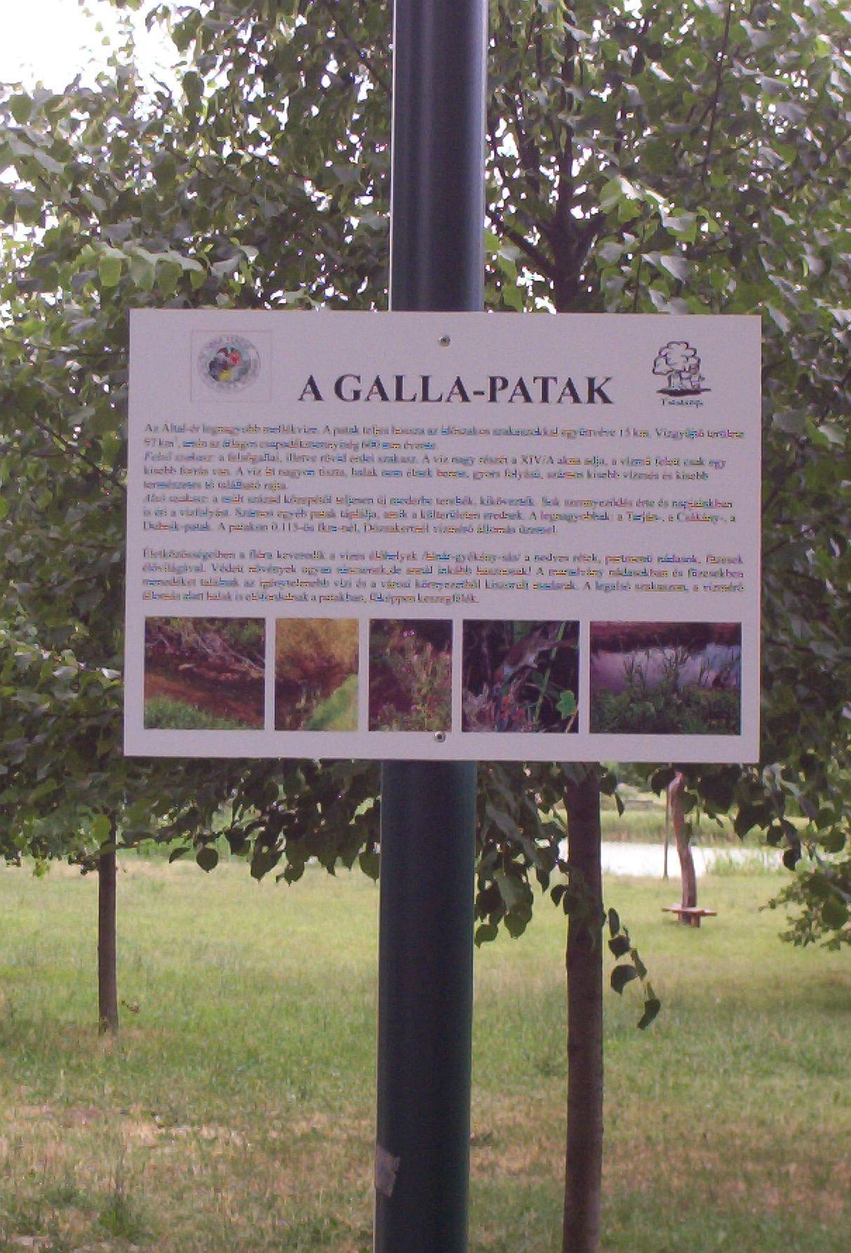 Tanösvény táblája a Galla-pataknál (Csónakázó-tó, Tatabánya)